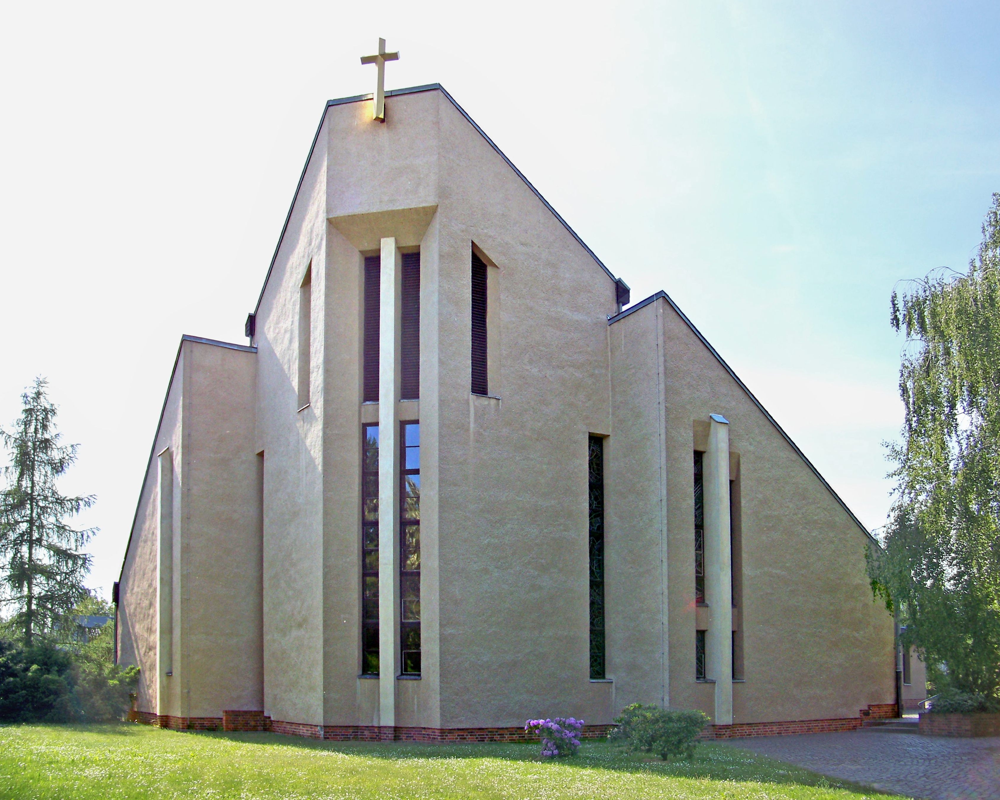 Katholische St. Martin-Kirche in Leipzig-Grünau West, Kiewer Straße